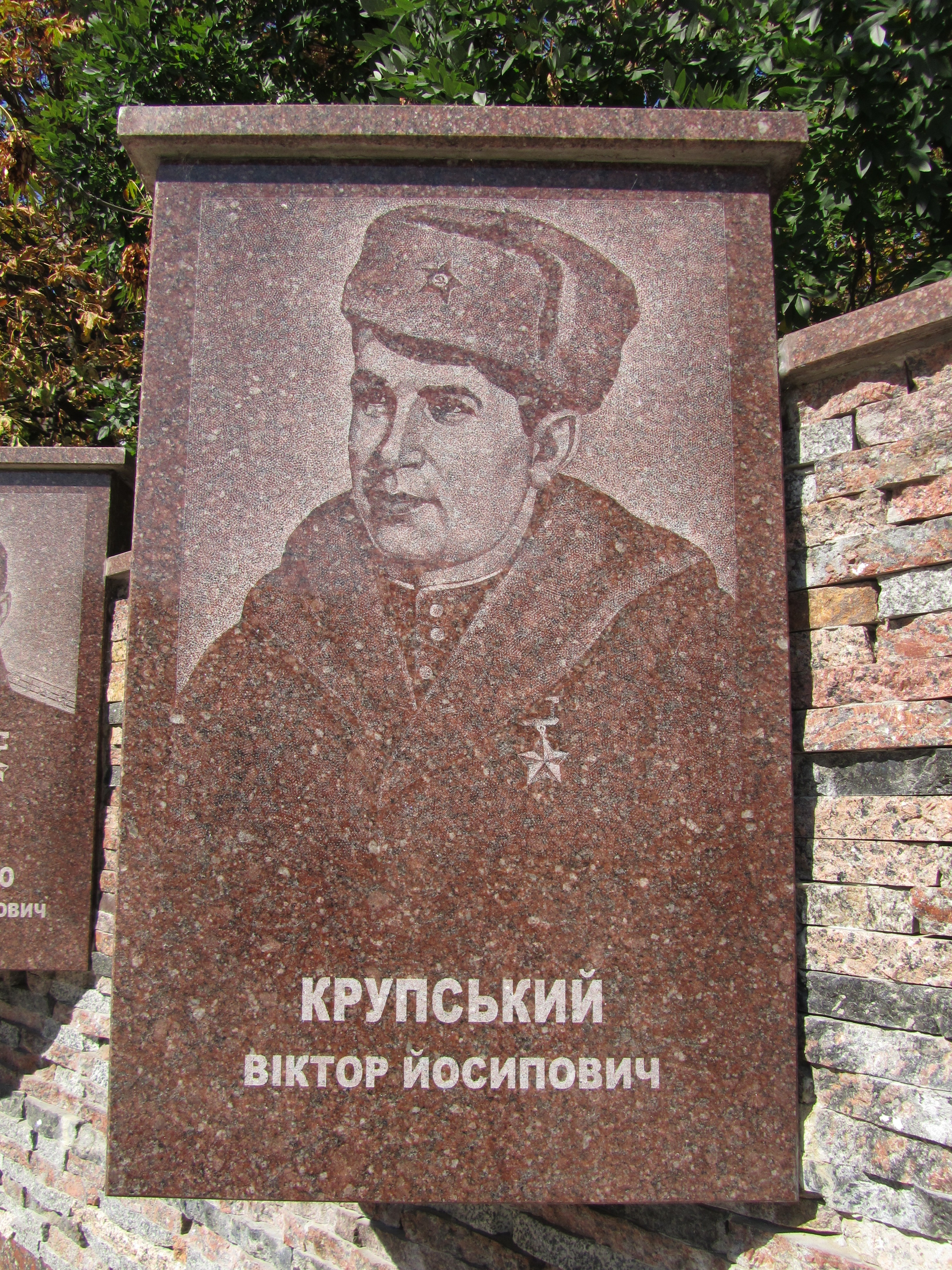 Алея Героїв - Крупський Віктор Йосипович (2011.09.20)